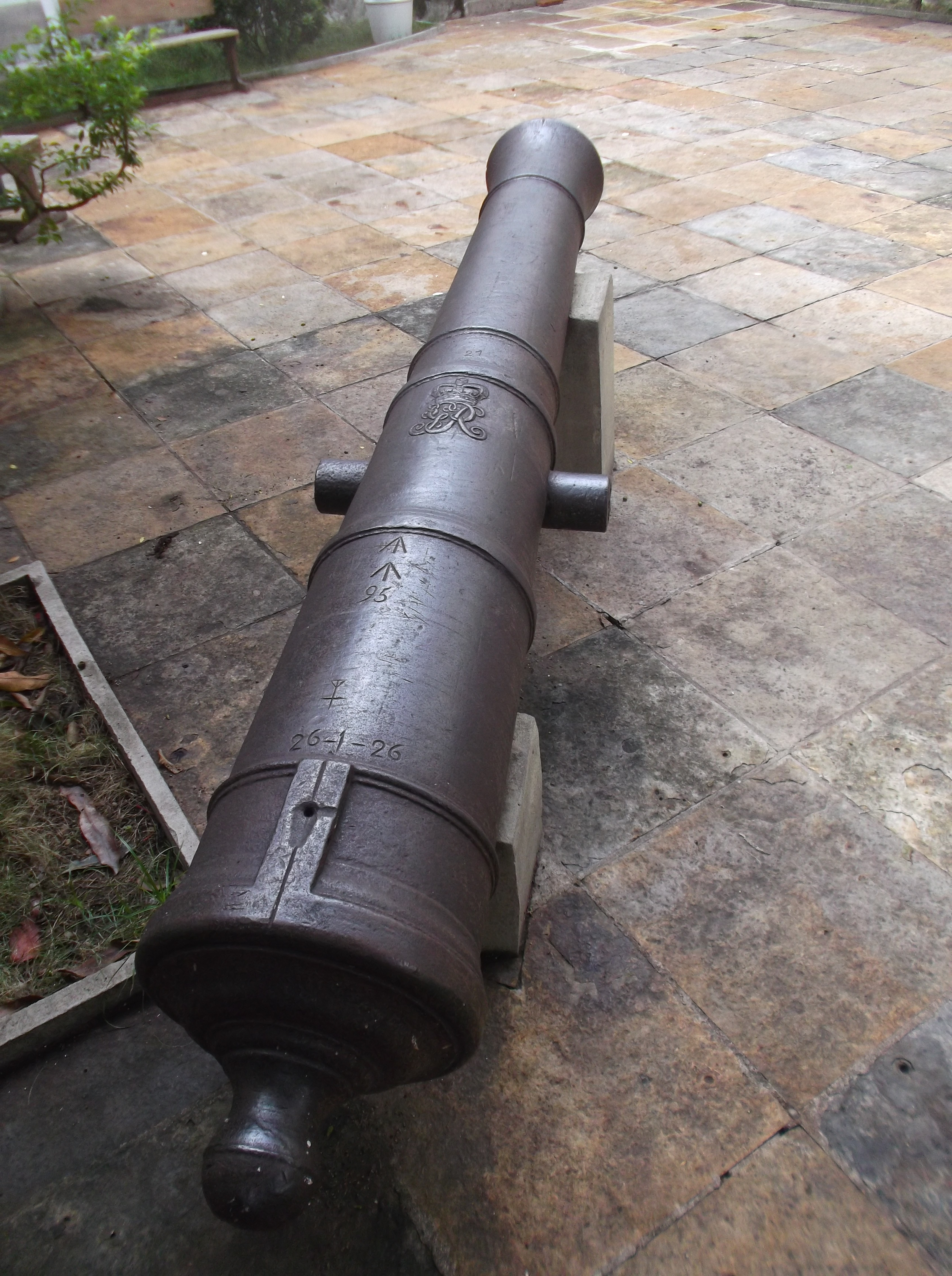 Canhão da época do Brasil colônia na praça do pátio do do Museu do Piauí.